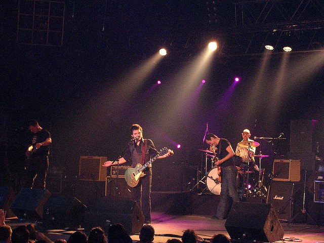 Los Ronaldos actuando en la sala Aqualung, Madrid, el 22 de diciembre de 2005.